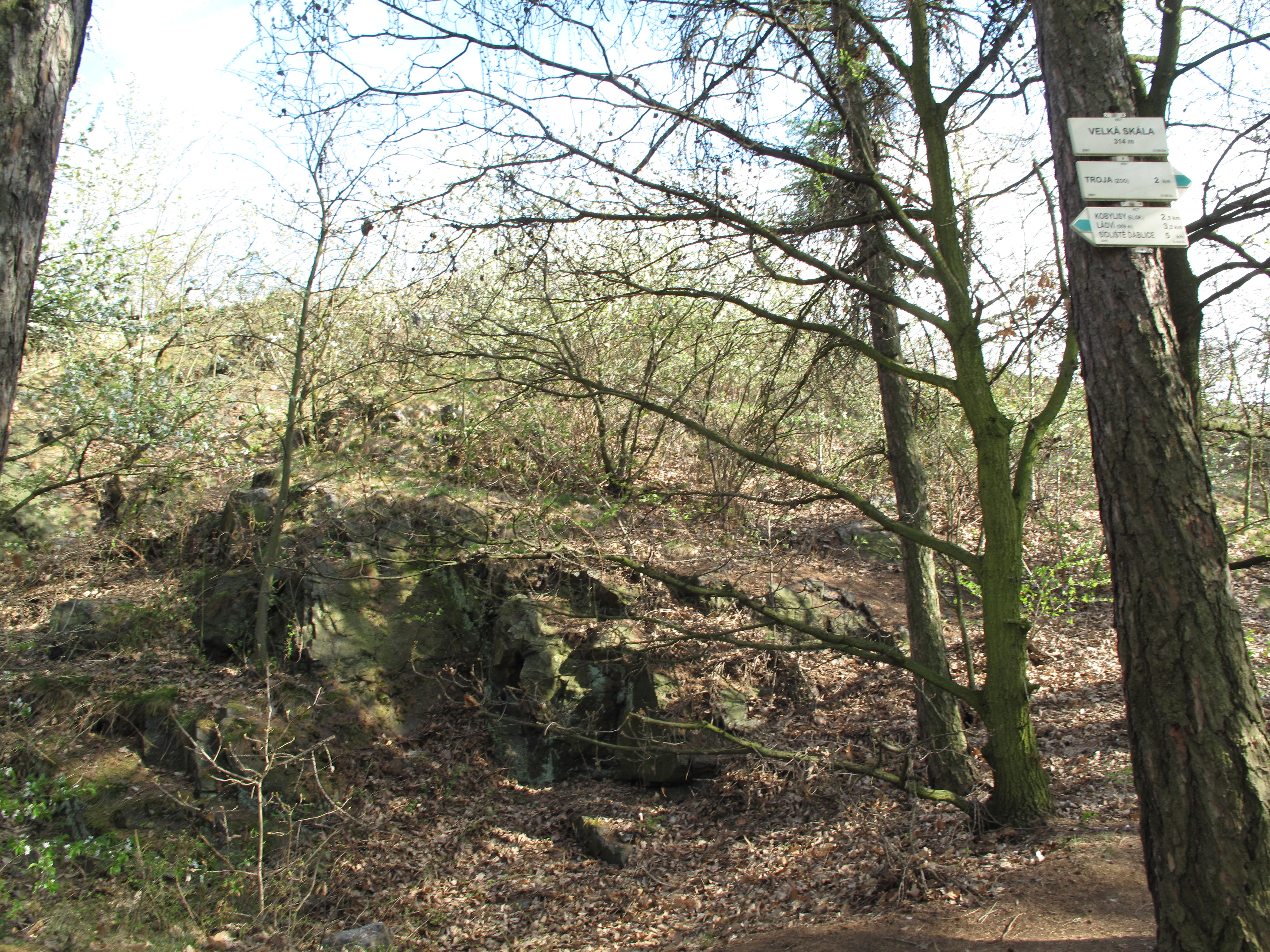 Velká skála